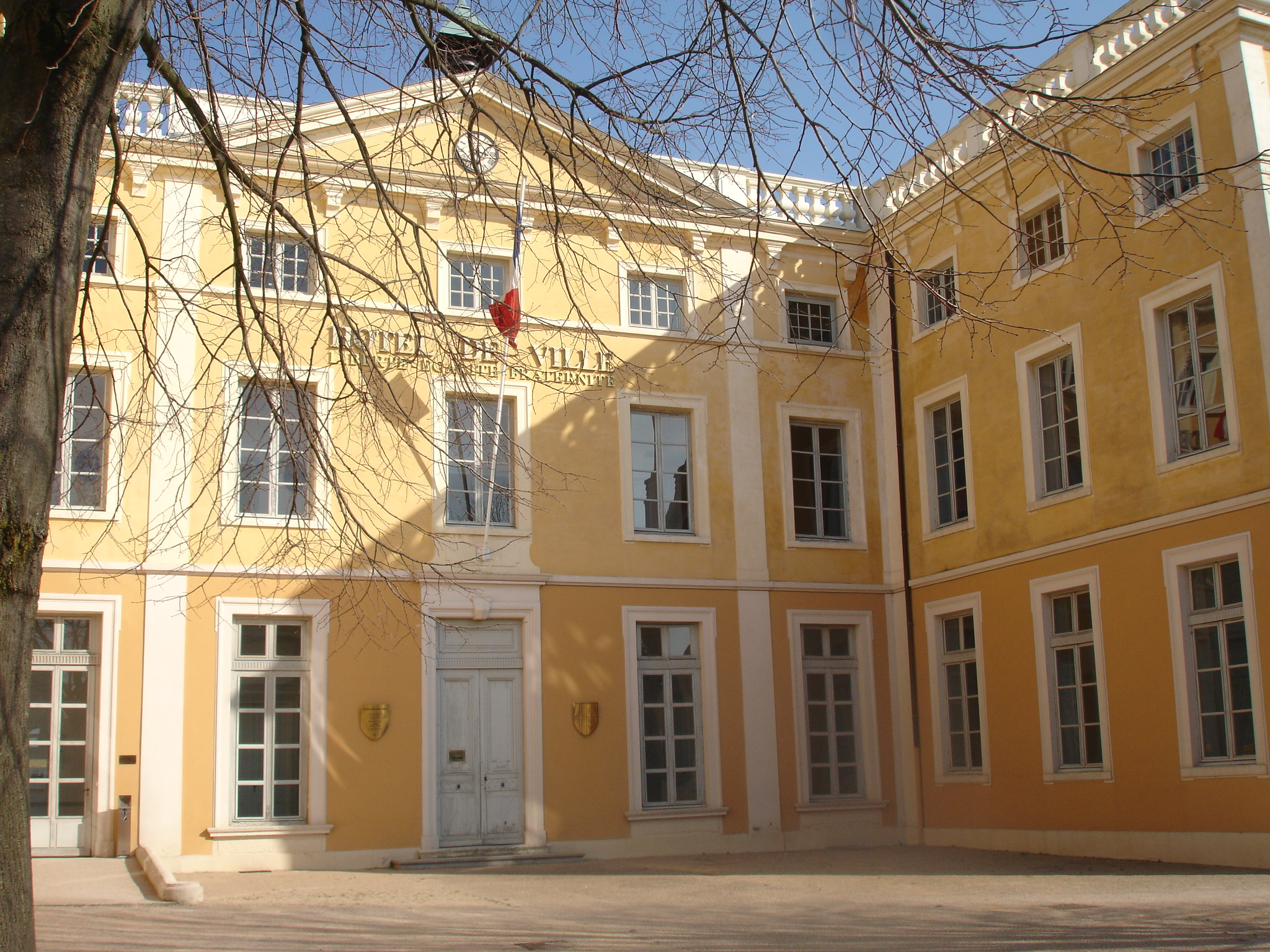 Saint-Symphorien-d'Ozon : la mairie